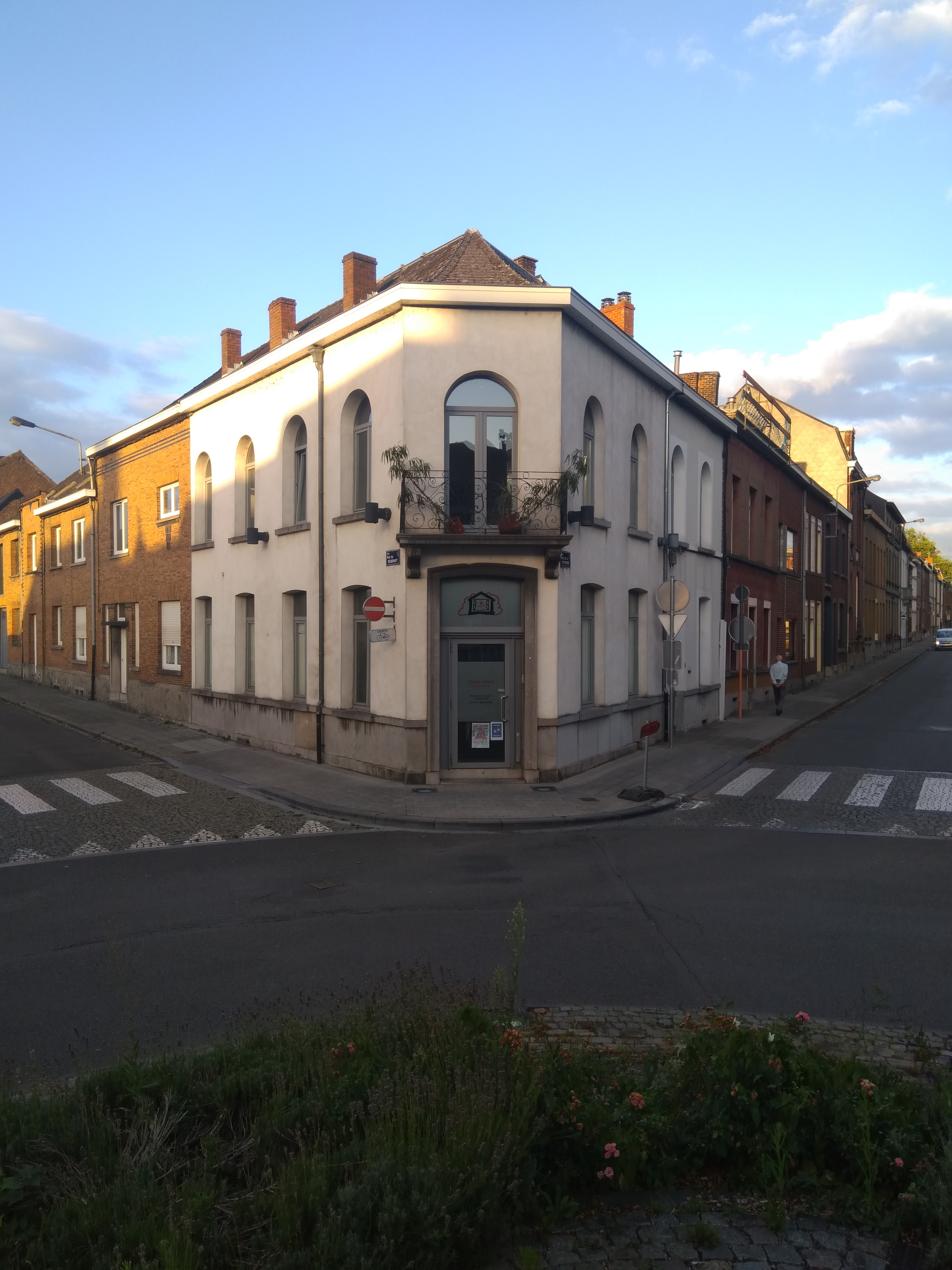 "Espace laïque Eugène Defacqz" à Ath (L'association s'appelle "Maison de la laïcité du Pays d'Ath")